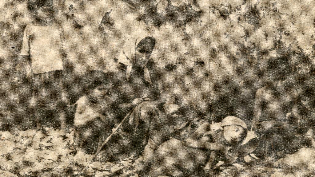 صورة لعائلة لبنانية في مجاعة 1917